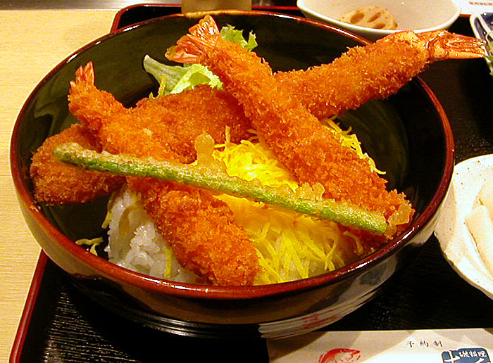 撮影者:小太刀 しゃちほこ丼。名古屋市南区の磯料理 志ヅ重にて撮影。しゃちほこ丼とはエビフライをシャチホコに見立てて飾りつけたどんぶりのことです。ここのしゃちほこ丼は白飯の上に乗っていますが他店ではハヤシライスなどに乗せたしゃちほこ丼もあります。